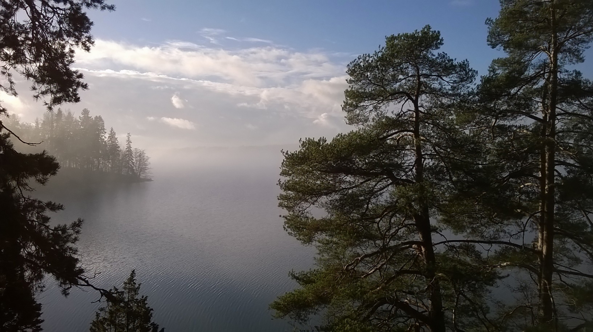 Maisema Fjällbon kallioilta